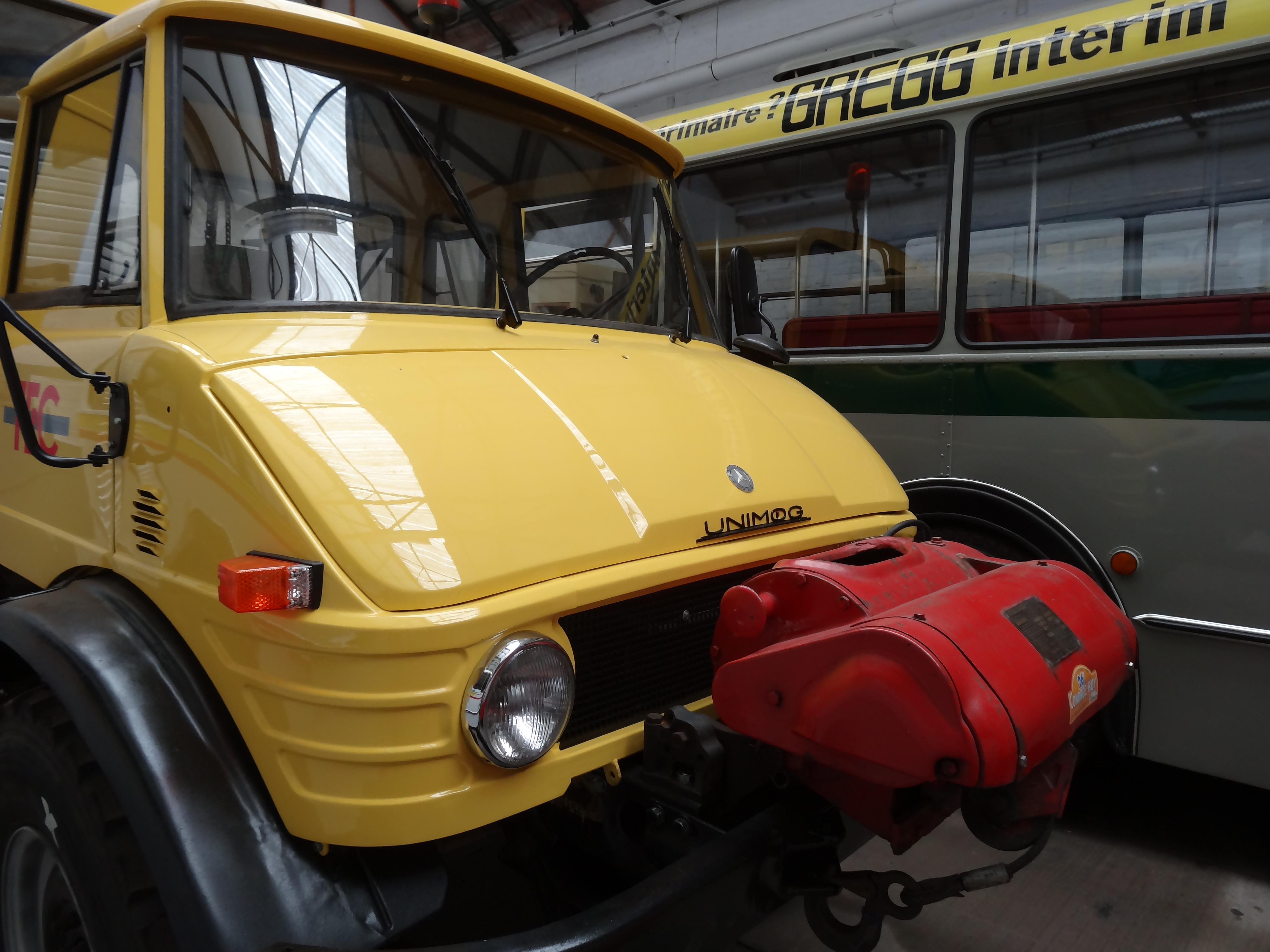 Musee des Transports en commun du Pays de Liege 034